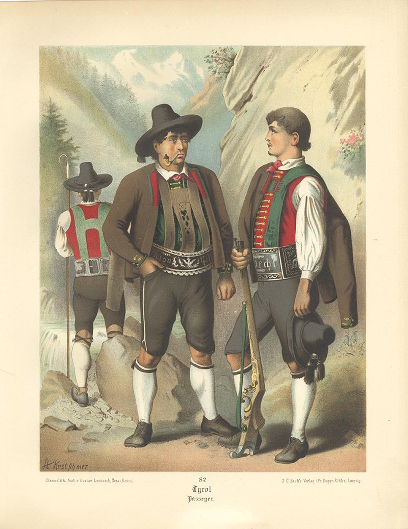 Deutsche Volkstrachten, Original-Zeichnungen mit erklärendem Text